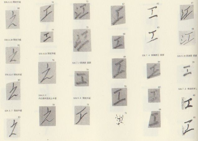 狭山事件の石川一雄が調書や手紙で書いた「江」「エ」「え」の文字写真。